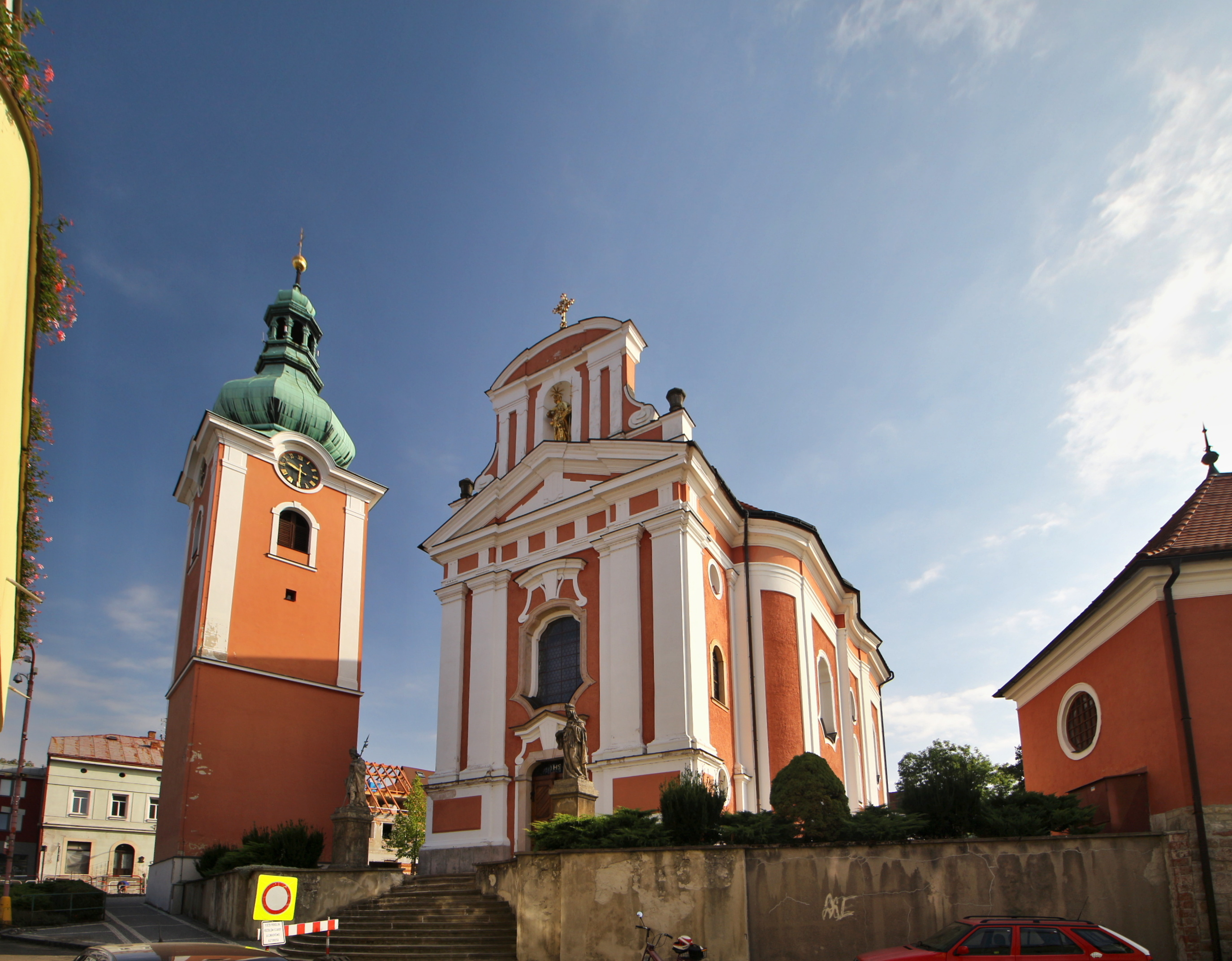 Kostel svatého Jakuba Většího v Červeném Kostelci